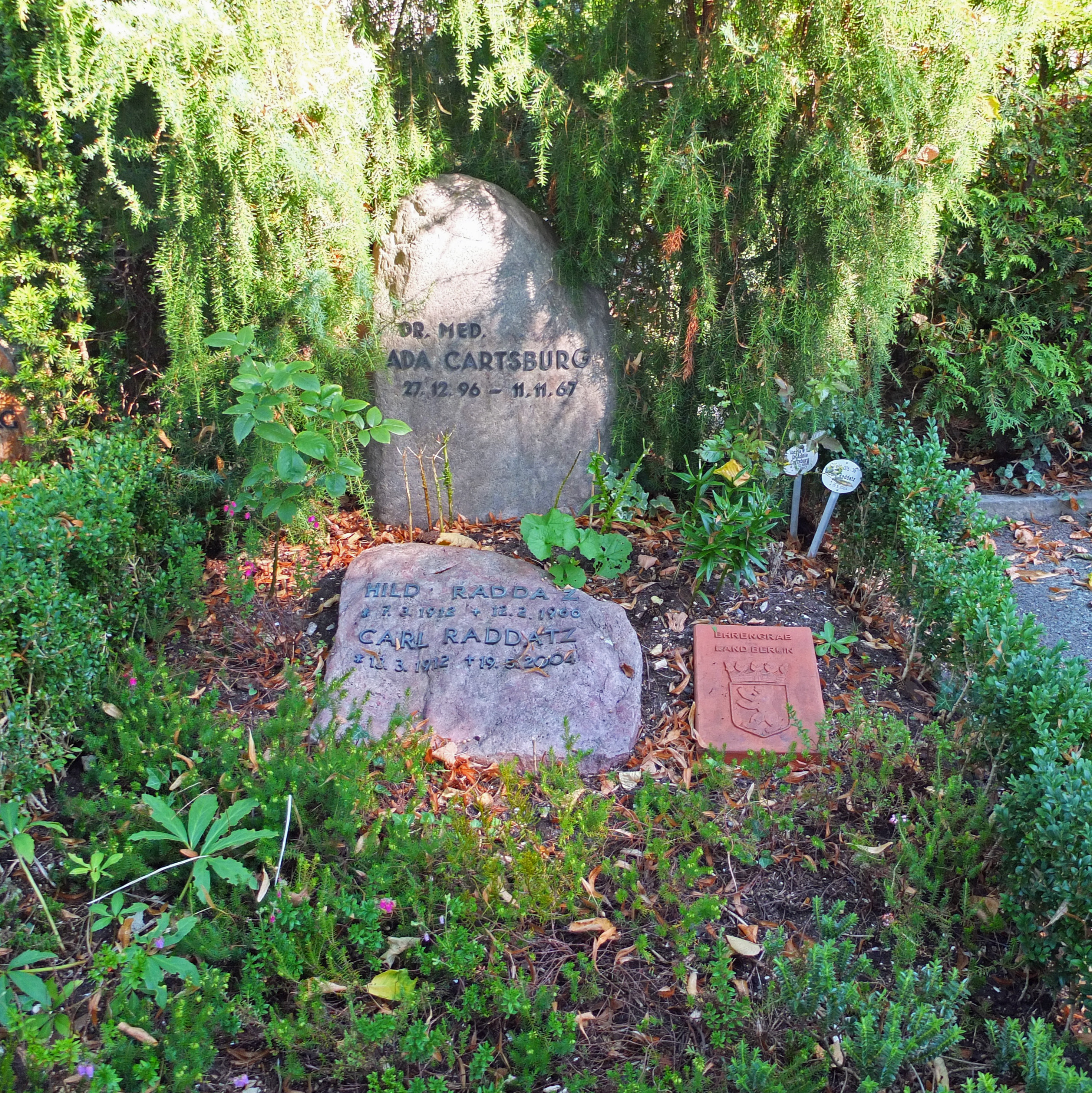 Grab von Carl Raddatz auf dem Friedhof Dahlem in Berlin.